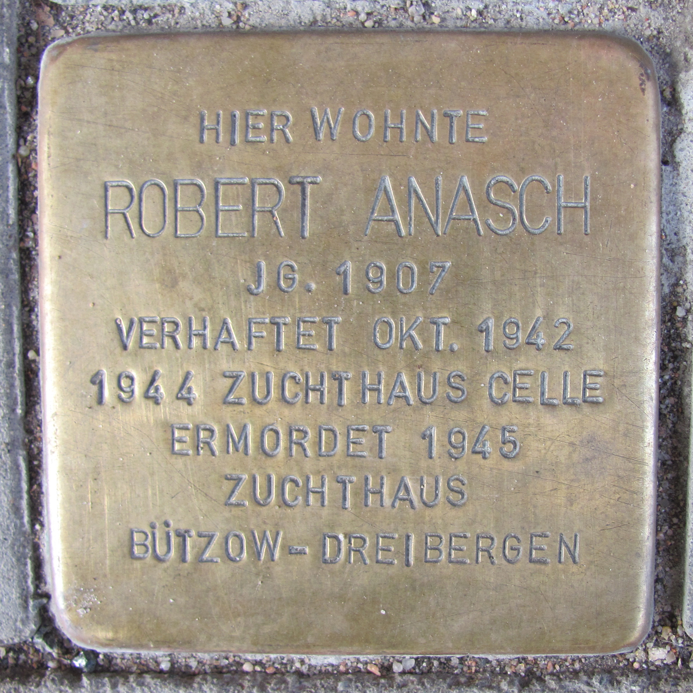 Stolperstein für Robert Anasch vor dem Haus Schenkendorfstraße 25